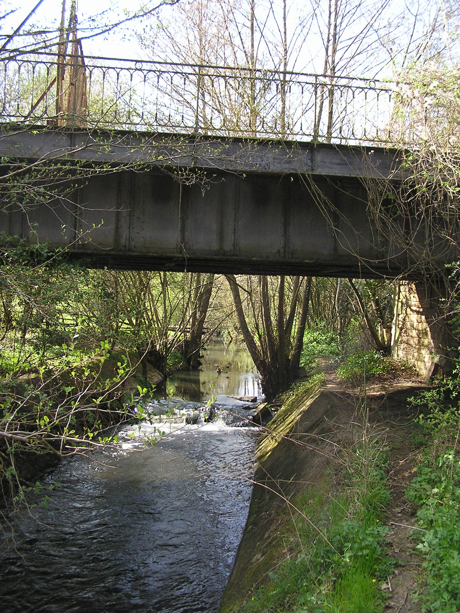 Pont enjambant l'Anille au niveau de l'ancienne voie de chemin de fer, près du Moulin Guillaume, à la Chapelle-Huon (72)